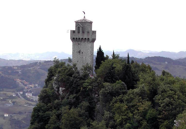 La torre detta "Il Montale" foto di Aldo Ardetti